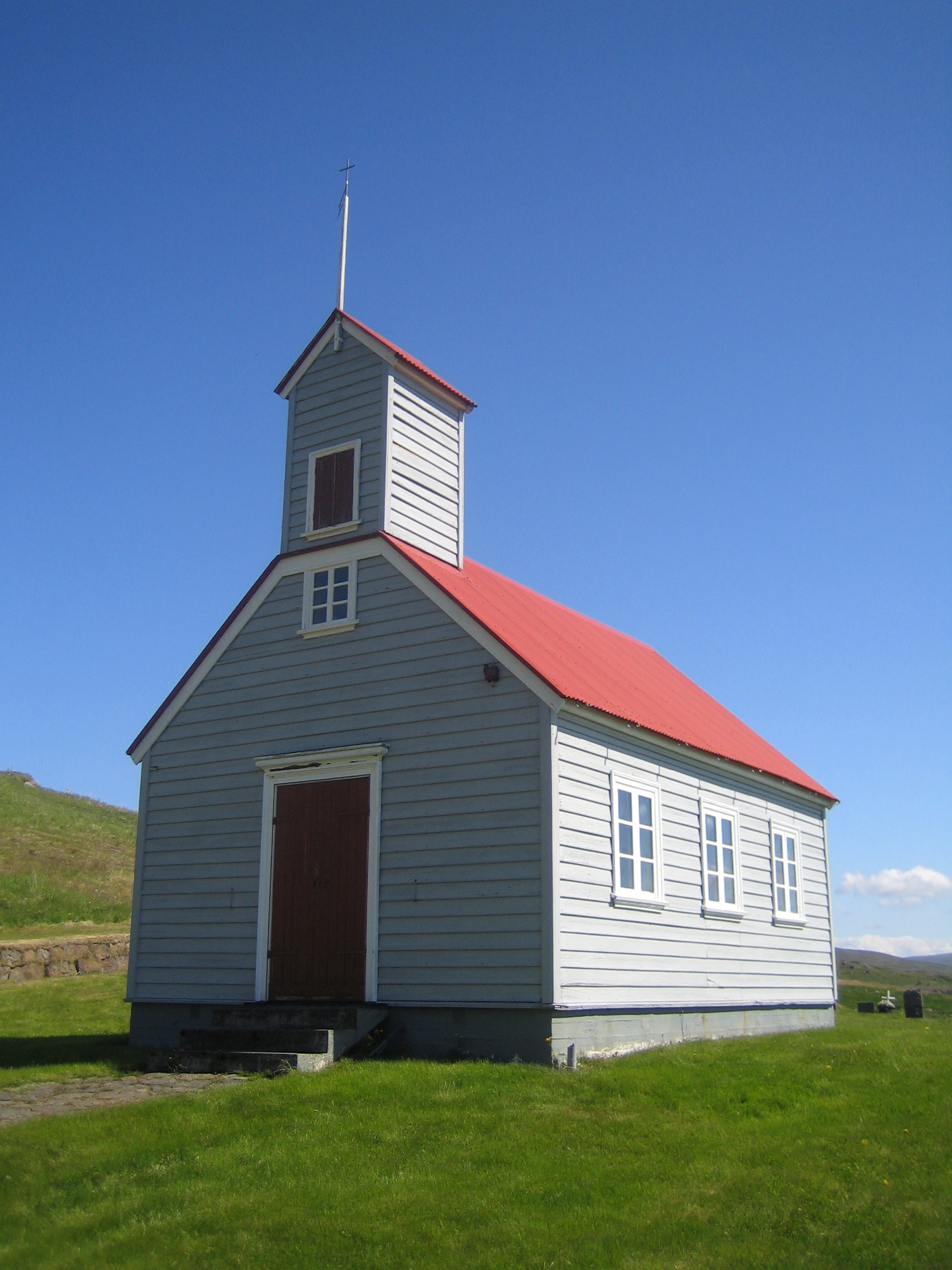 Kirkjan á Hvammi í Borgarfjarðarprófastsdæmi